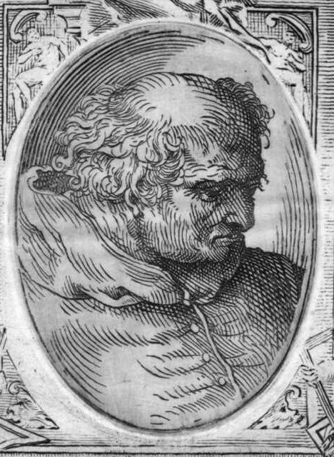 Графічний портрет архітектора Донато Браманте